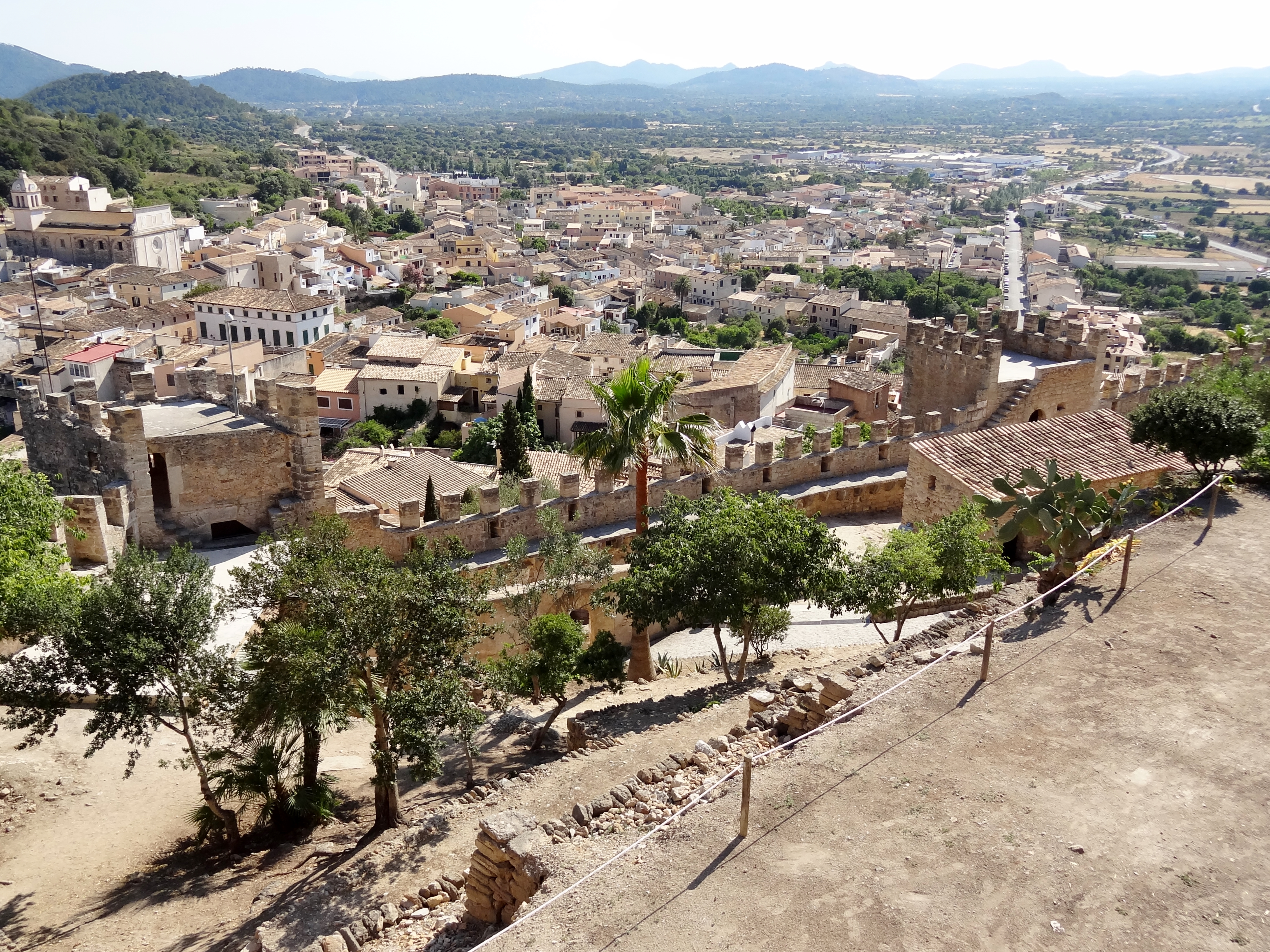 Castell de Capdepera, Gemeinde Capdepera, Mallorca, Spanien